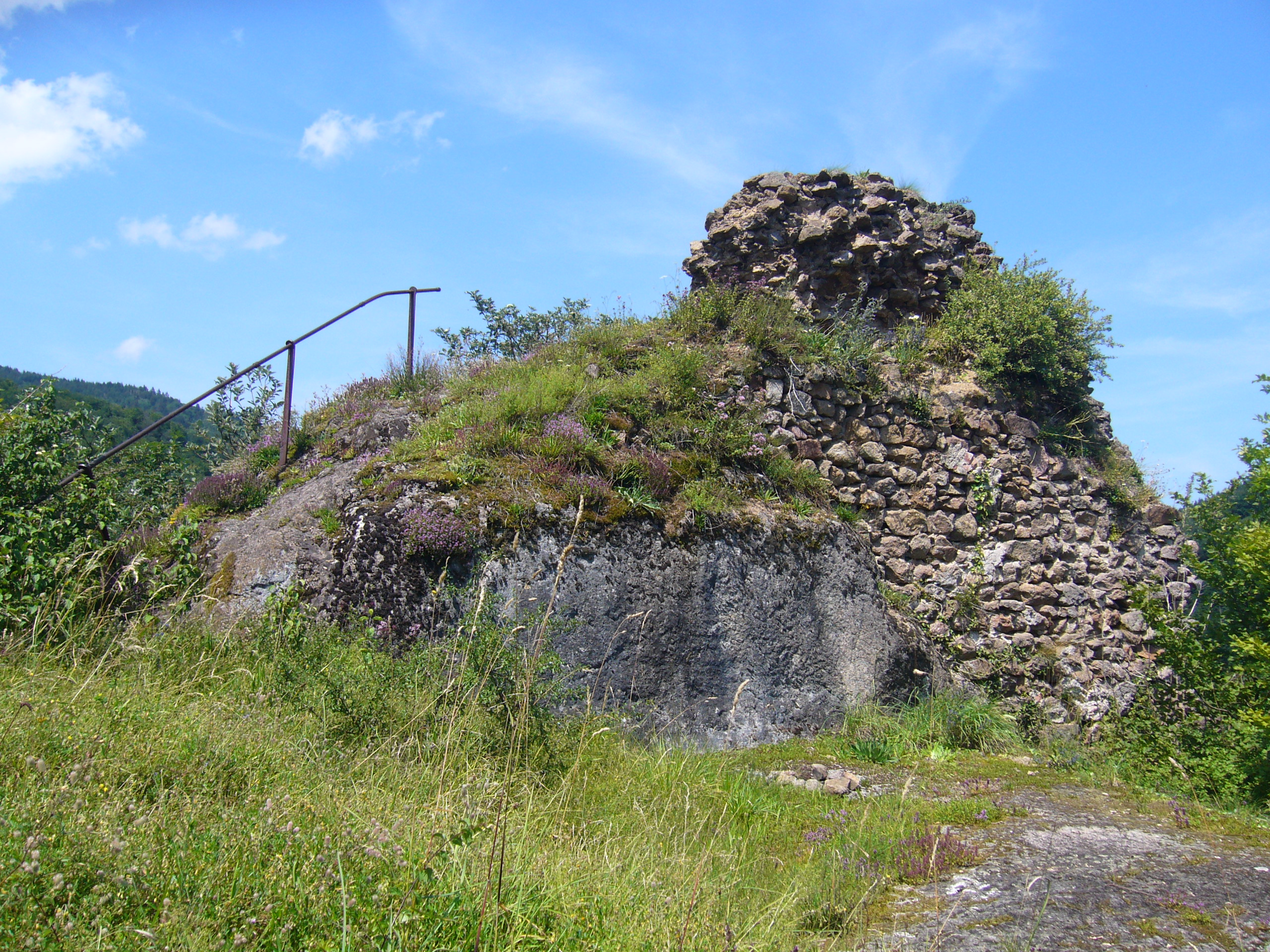 Sommet du château d'Echéry